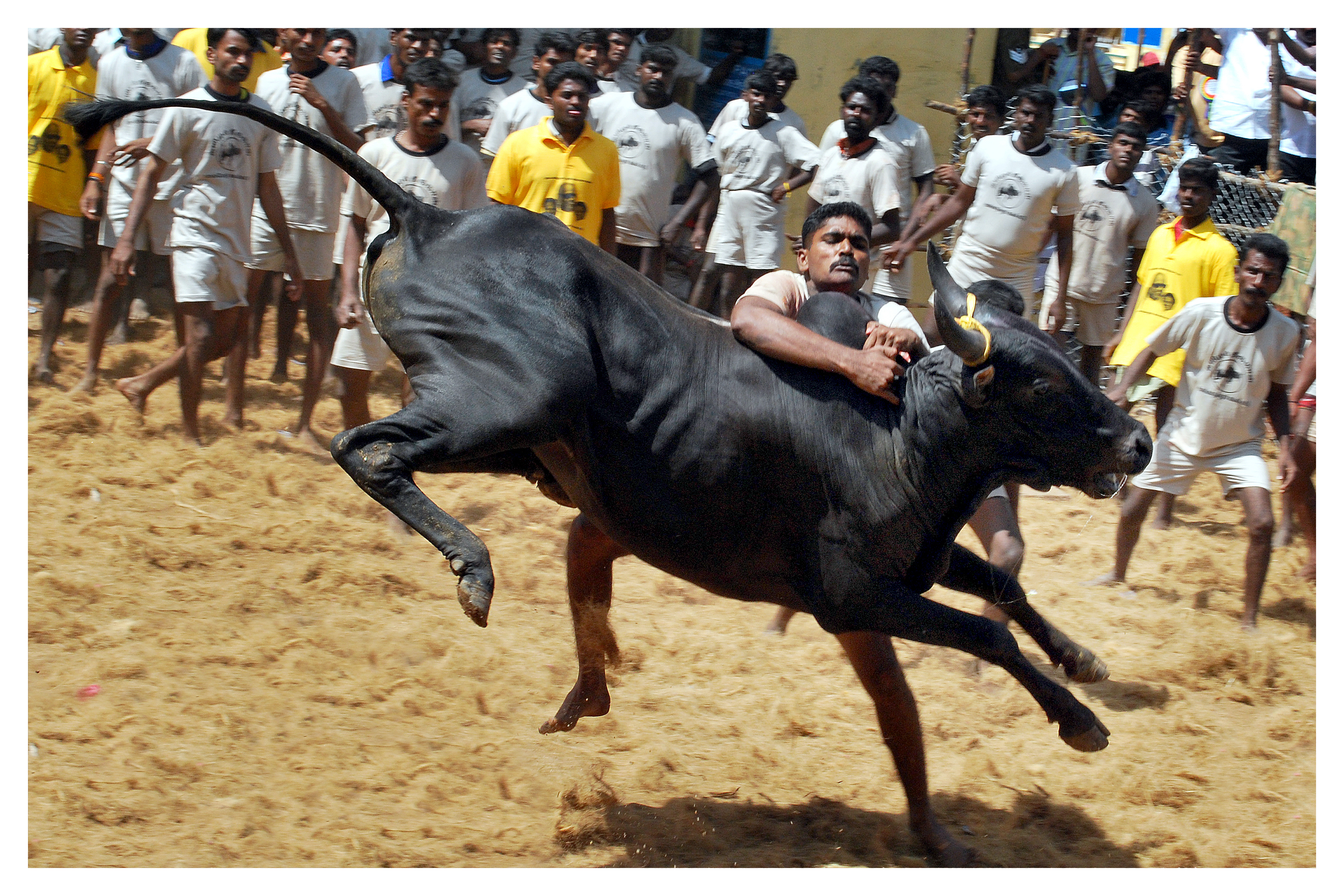 தமிழர் வீரம்